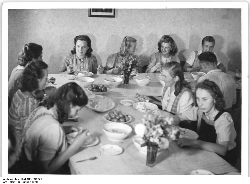 Petkus, Auszubildende beim Essen Saatzuchtbetrieb Petkus (siehe Begleittext) UBz: Nach des Tages Müh´und Arbeit hat man guten Appetit. Den Assistentinnen und Lehrlingen des DSG-Saatzuchtbetriebes Petkus mundet das Essen immer gut. Aufn. Illus Klein (21) S91792 Mlk 6.1.1950